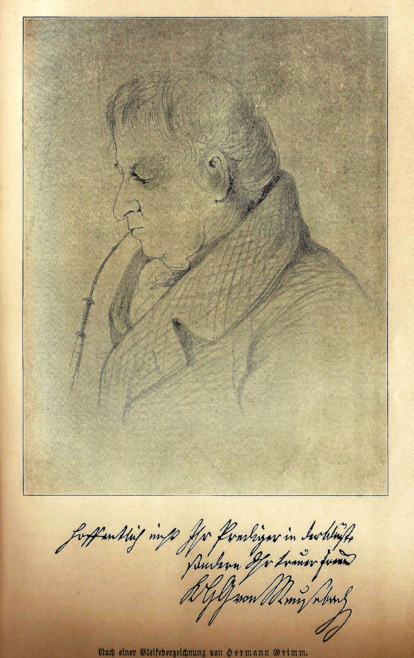 Karl Hartwig Gregor Freiherr von Meusebach, nach einer Zeichnung von Herman Grimm